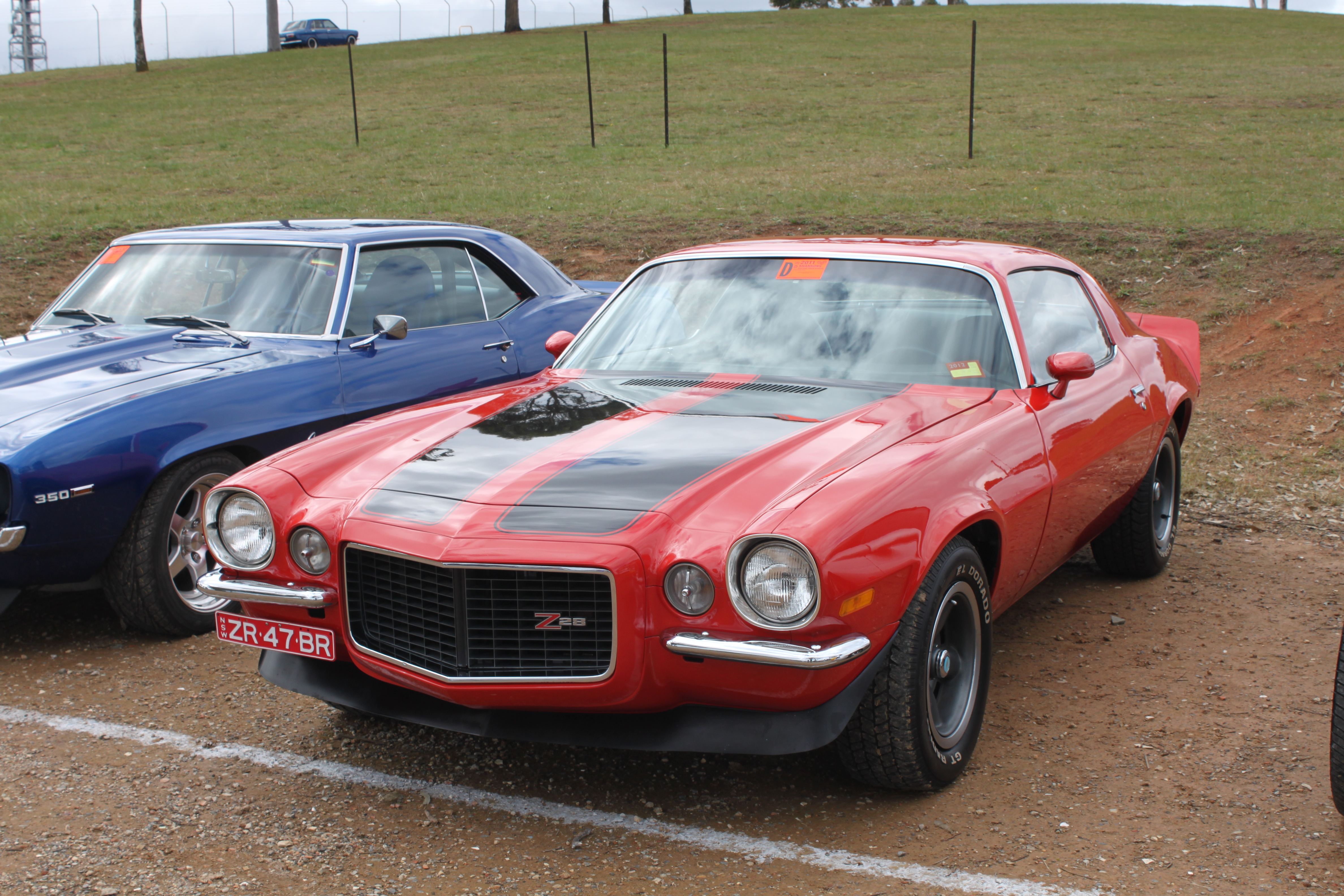 Chevrolet Camaro Z/28